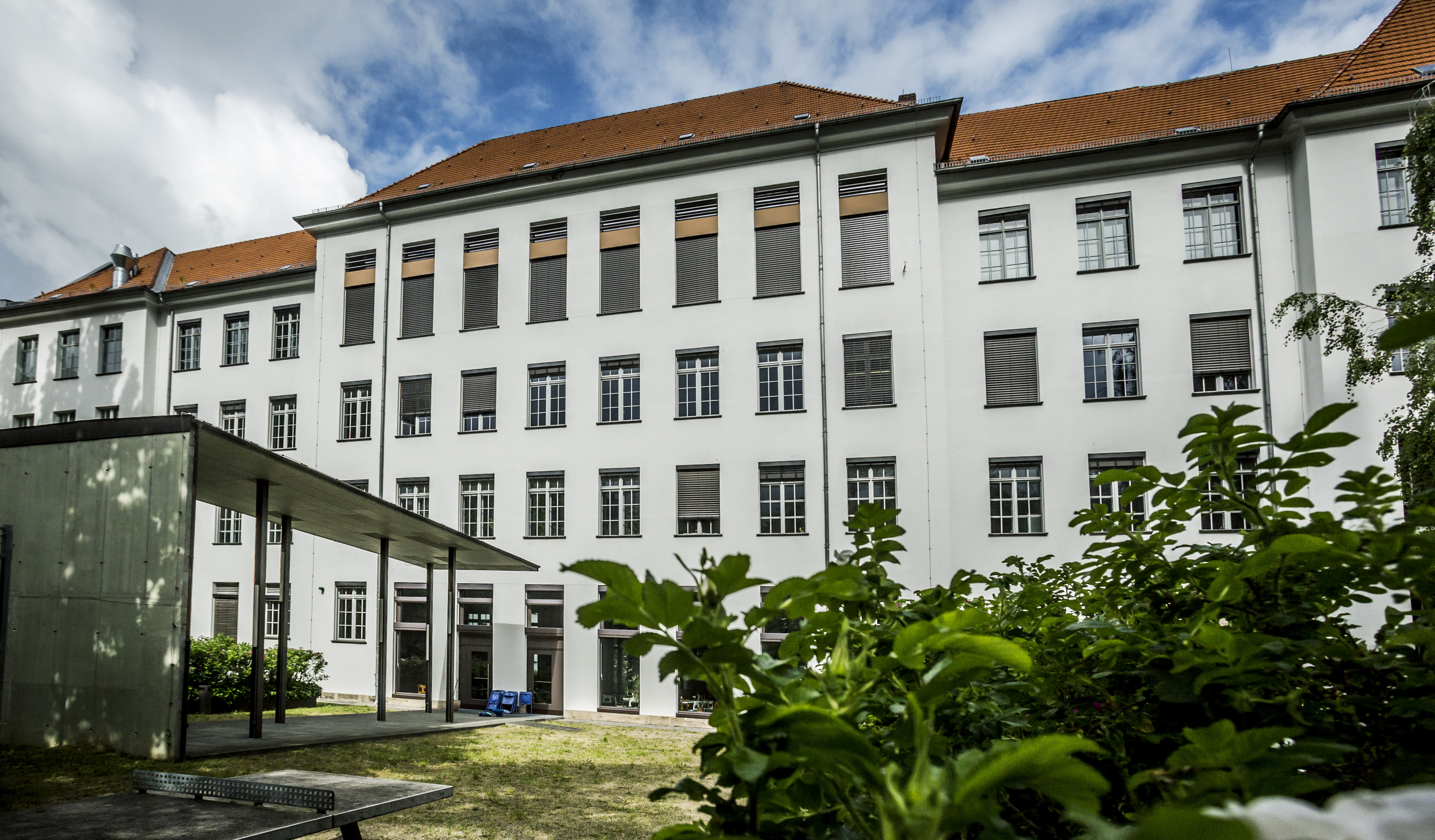 Elinor-Ostrom-Schule in der Mandelstraße, Berlin-Prenzlauer Berg